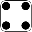 European die face 4